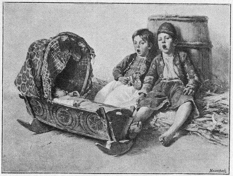 Eia popeia